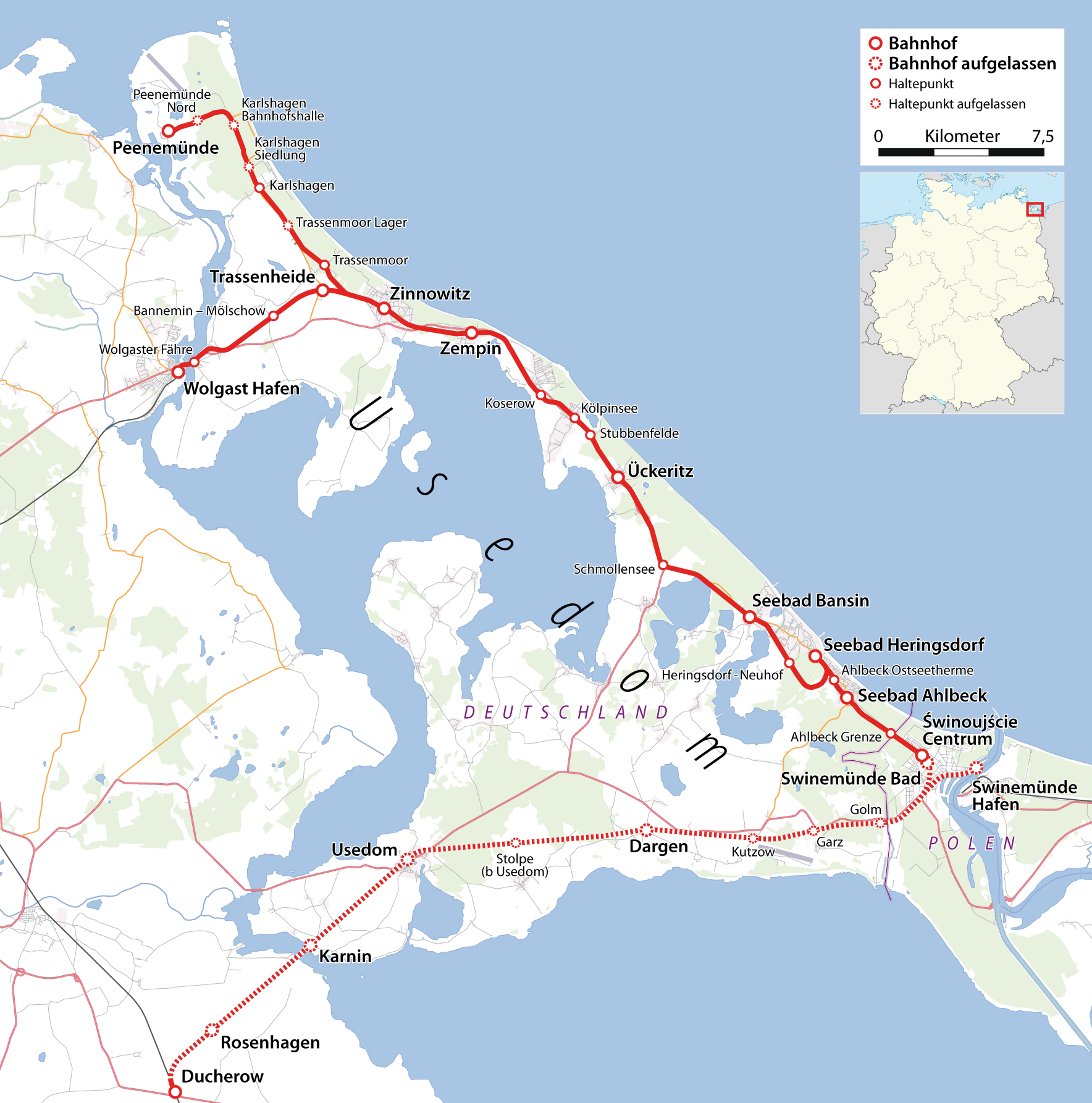 Karte der Bahnstrecken auf der Insel Usedom